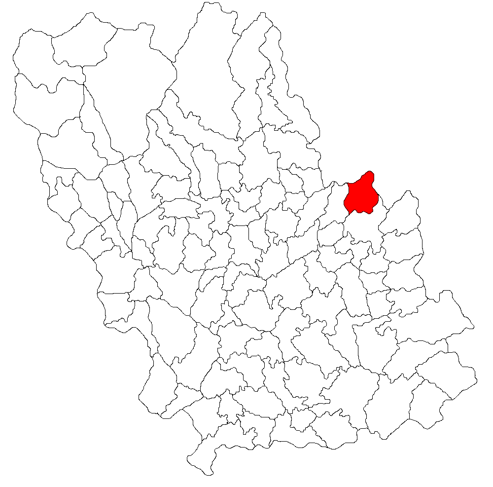 Categorie:Hărţi ale judeţului Prahova